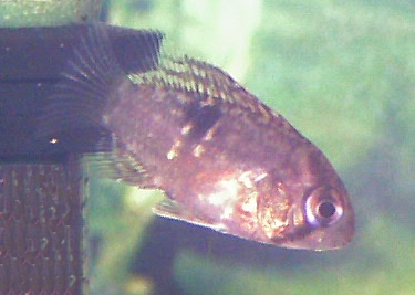 Cleithracara maronii, Jungtier